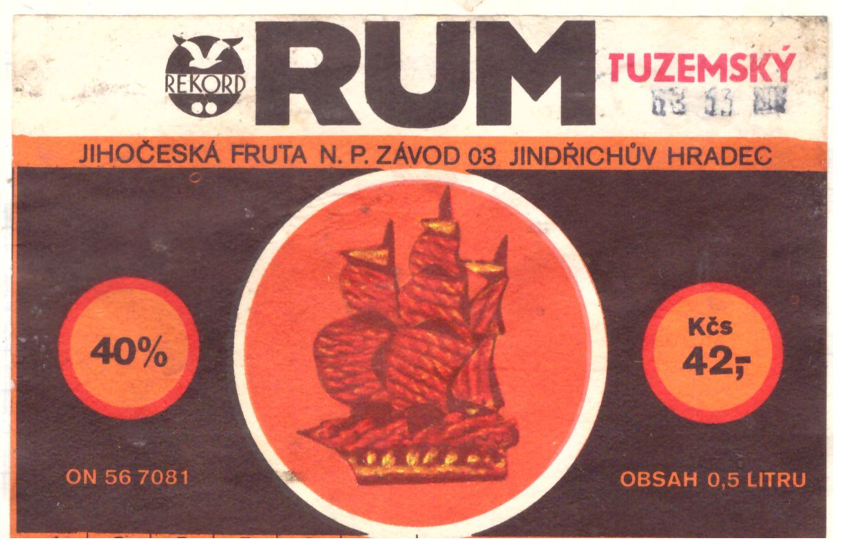 Nálepky z obalů potravin. Rok 1985 - 1986. Produkty prodávané v ČSSR. Czech Republic.